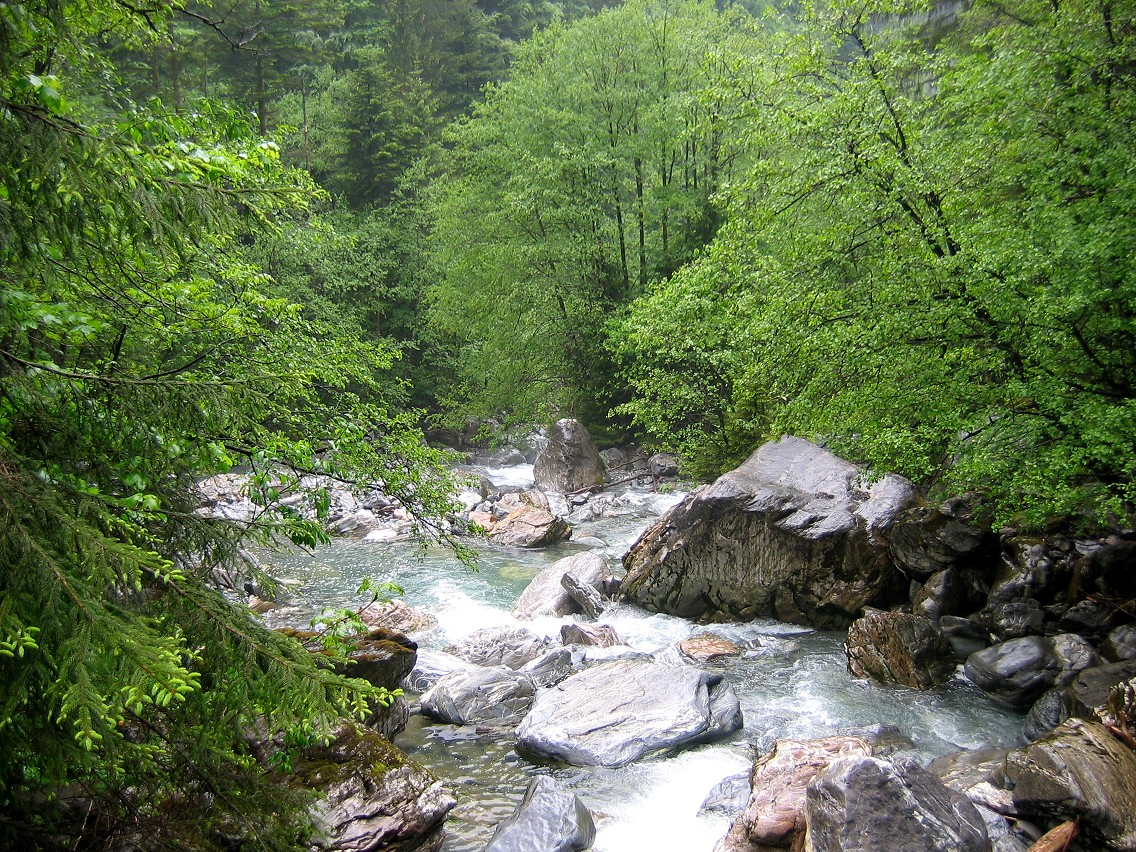 Aatobel in der Aaschlucht ca. 2km nördlich des Ortsausgangs Engelberg.